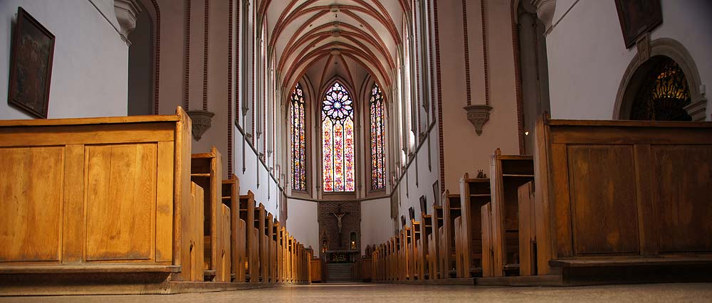 Wrocław Stare Miasto, pl. Dominikański 2 - dawny kościół klasztorny oo. Dominikanów, obecnie Kościół św. Wojciecha (zabytek nr 239/165)